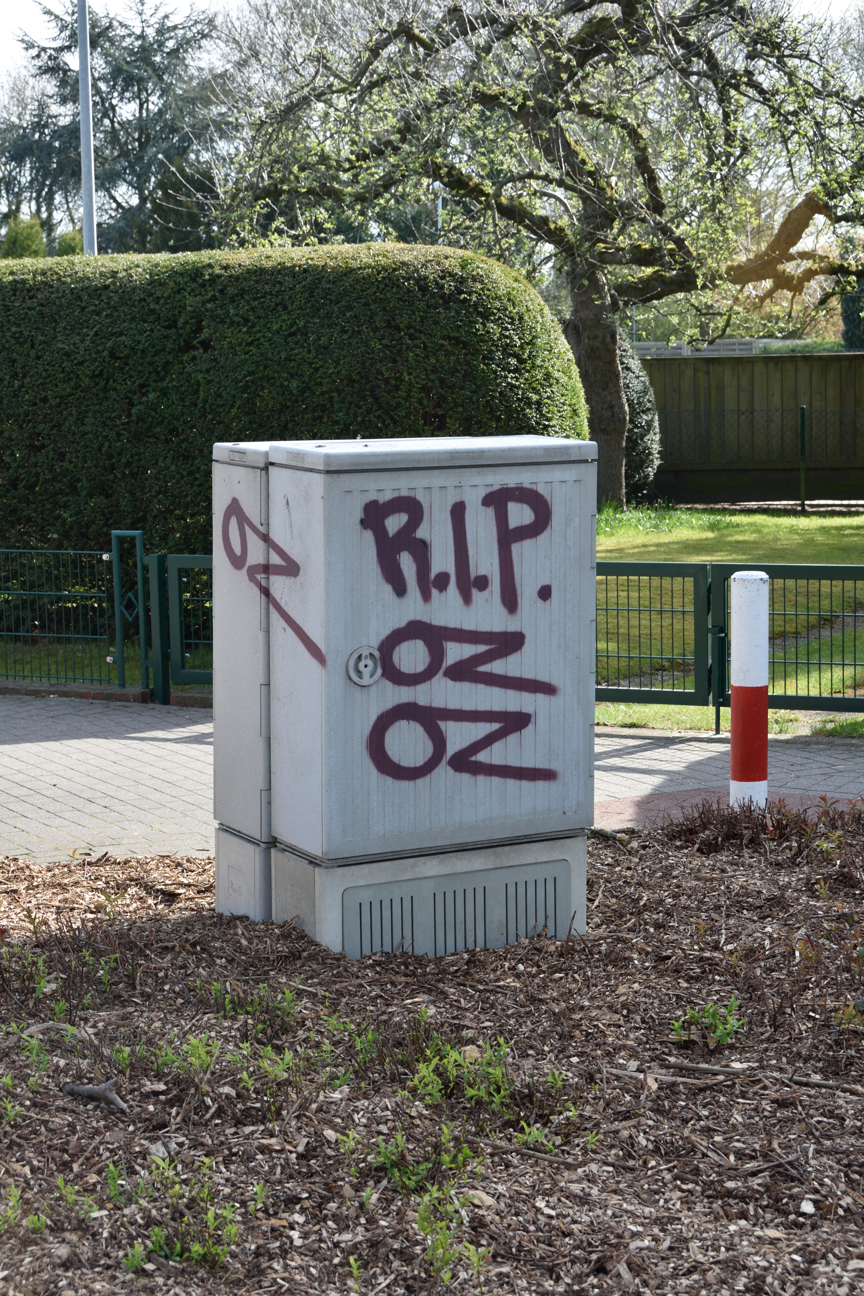 Erinnerung an den Sprayer OZ in Wedel